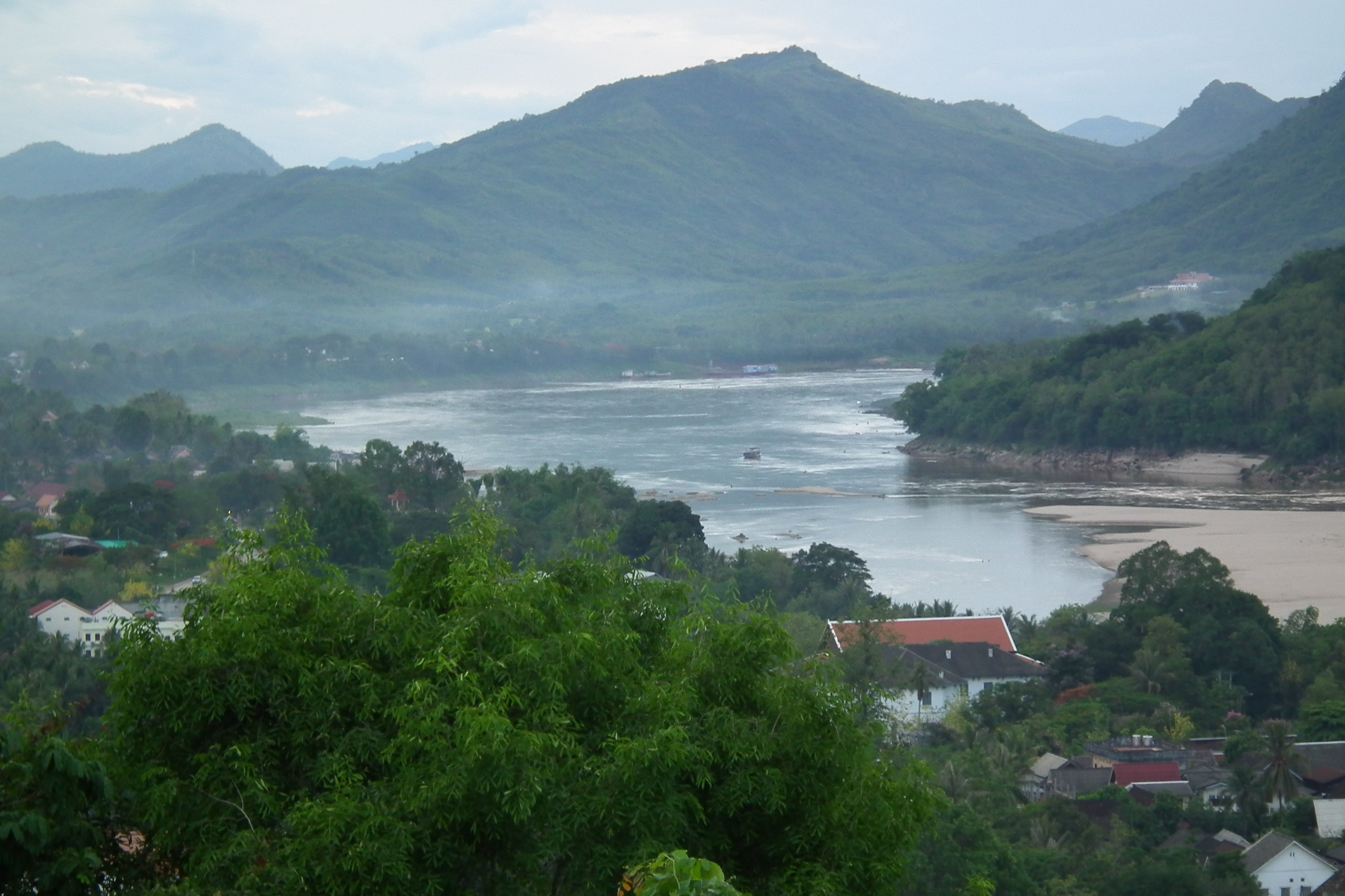 Phou si - Mekong River - Luang Prabang Laos プーシーの丘、メコン川 ラオス・ルアンプラバーン